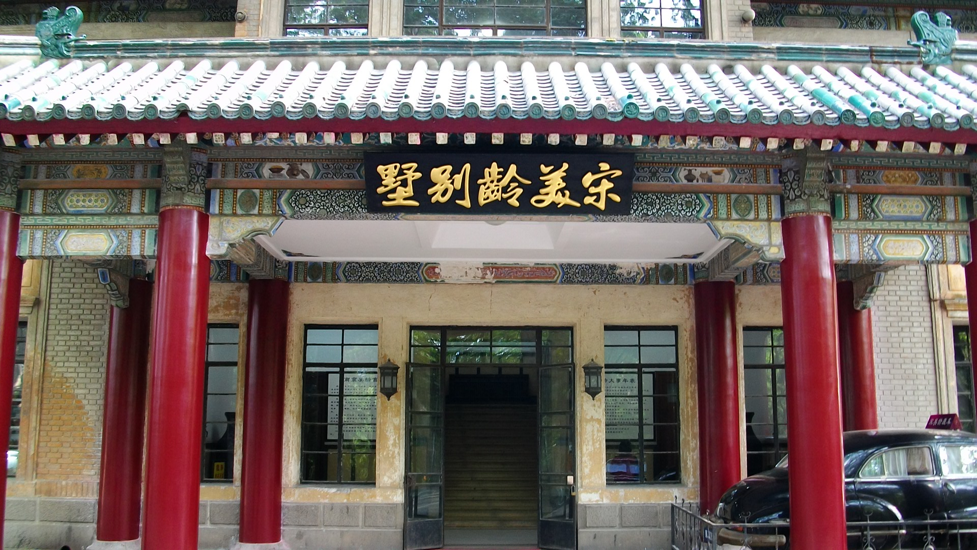 南京美龄宫。